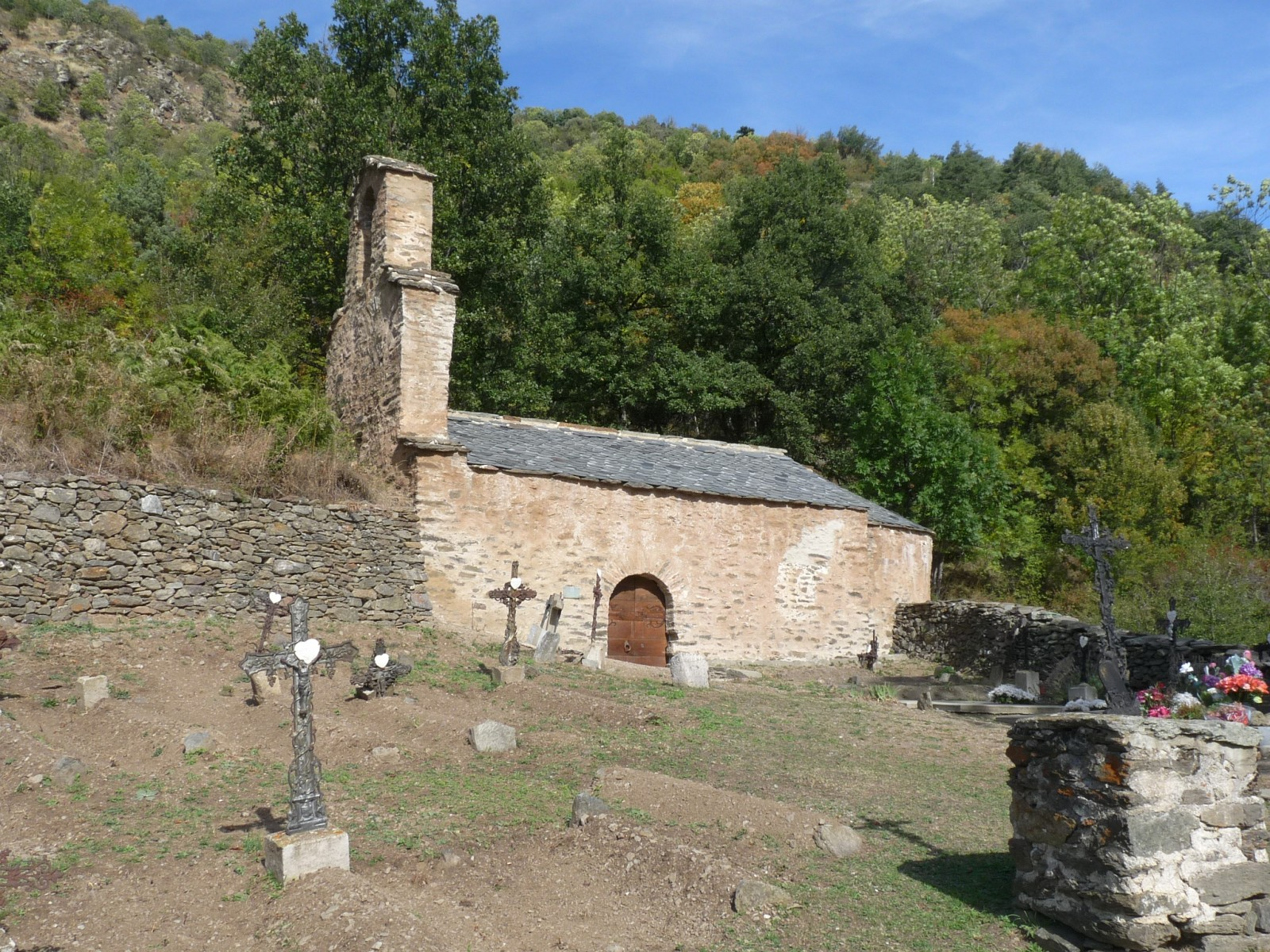 Église Saint-André de Llar , Pyrénées-Orientales, France